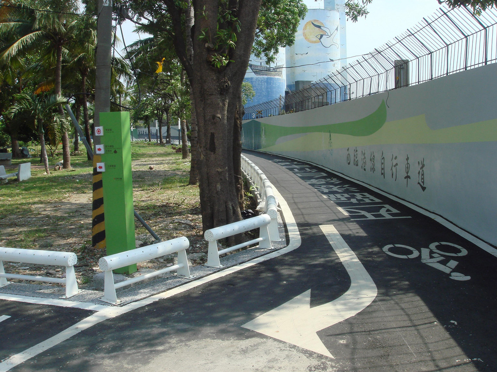 中文（台灣）: 西臨港線自行車道起點。